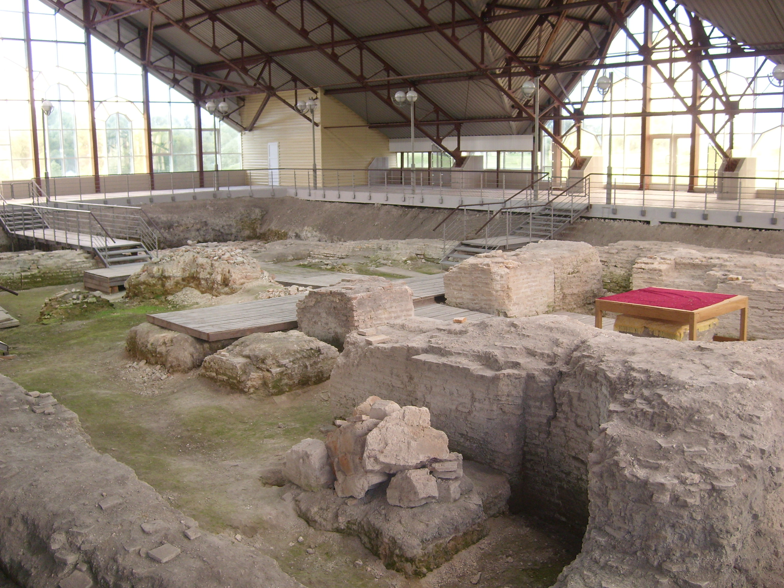 Беларуская (тарашкевіца): Гарадзішча старажытнага Турава пэрыяду раньняга сярэднявечча. г. Тураў This is a photo of Belarusian heritage monument. Reference number: 313В000360 ( WLM)